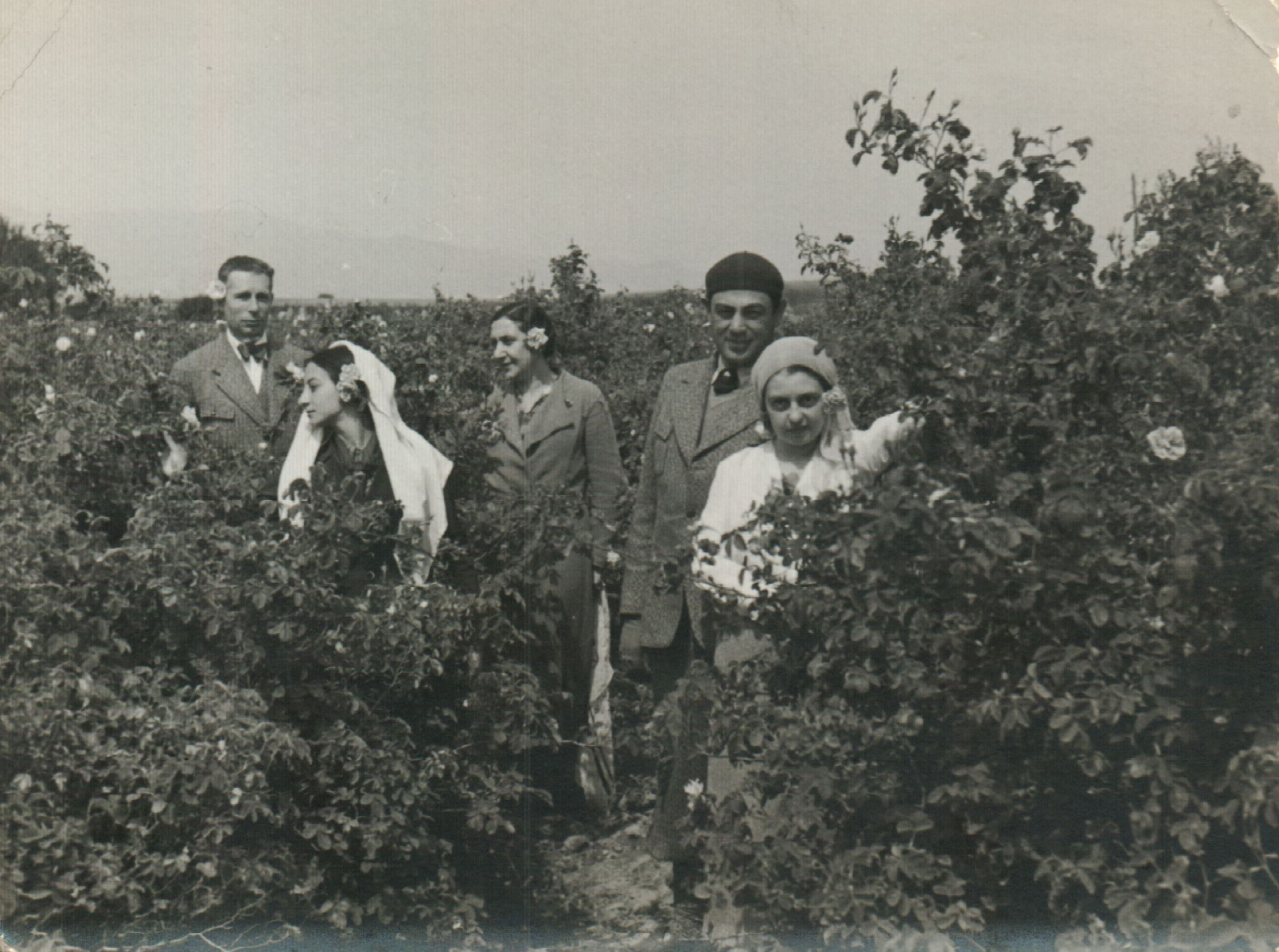 Групова снимка на инж. Стоян Митов със съпругата му Мария и приятели в Розовата долина.